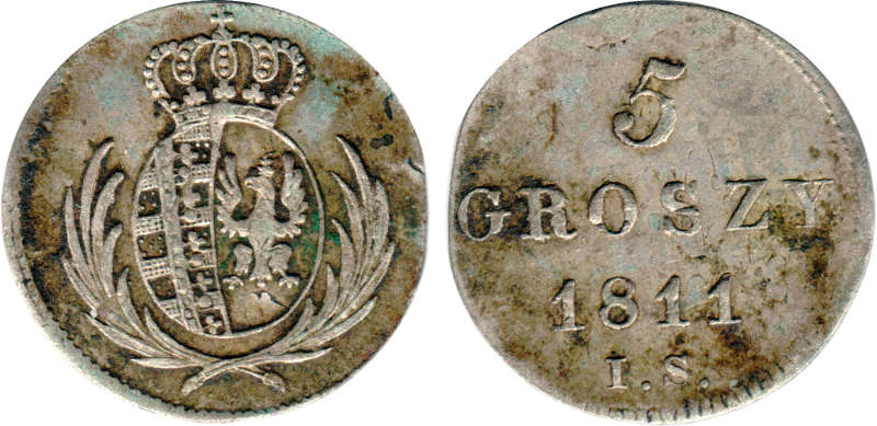 5 groszy 1811 IS inne galazki